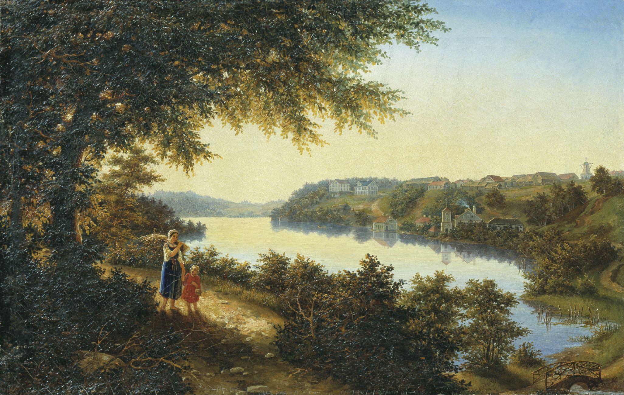 Название: Имение Глубокое. Автор: Волосков Алексей Яковлевич. Размер: 40x62. Техника исполнения: холст, масло